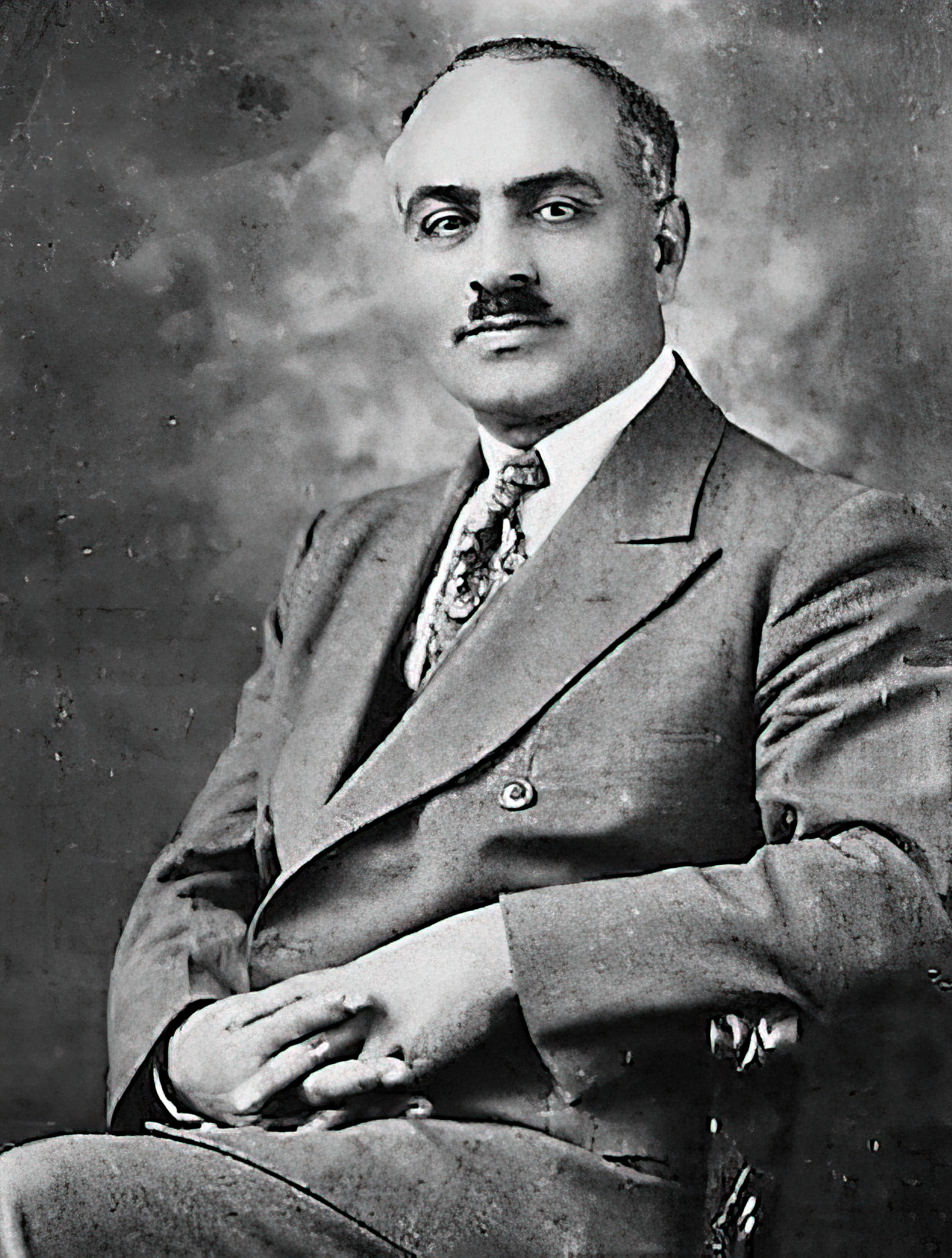 Гарегин Нжде (арм. Գարեգին Նժդեհ, 20 января (2 февраля) 1886(18860202) — 21 декабря 1955) — армянский военный и государственный деятель.